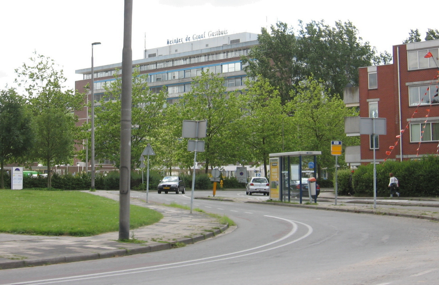 Reinier de Graaf Gasthuis Delft (2008)